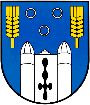 Wappen von Wollmerath